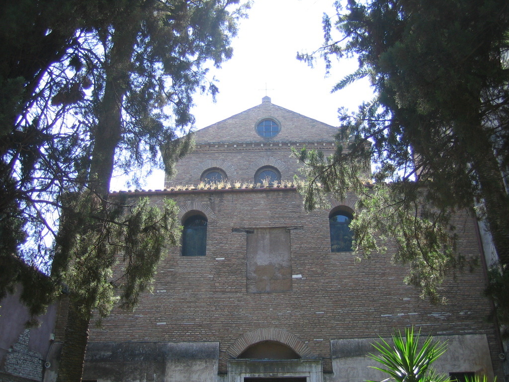 Fassade der Kirche St'Agnese fuori le mura in Rom